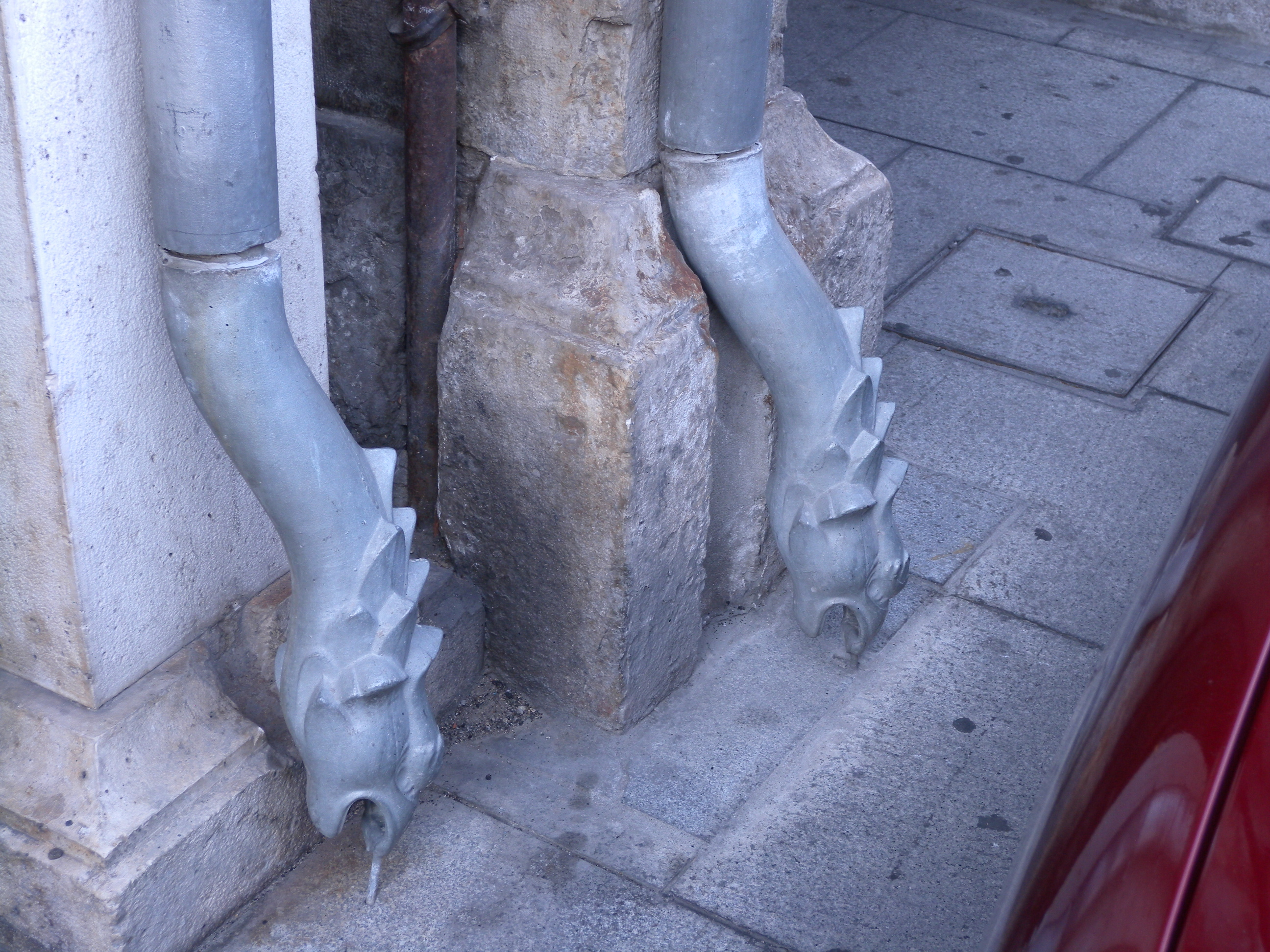 Serpientes